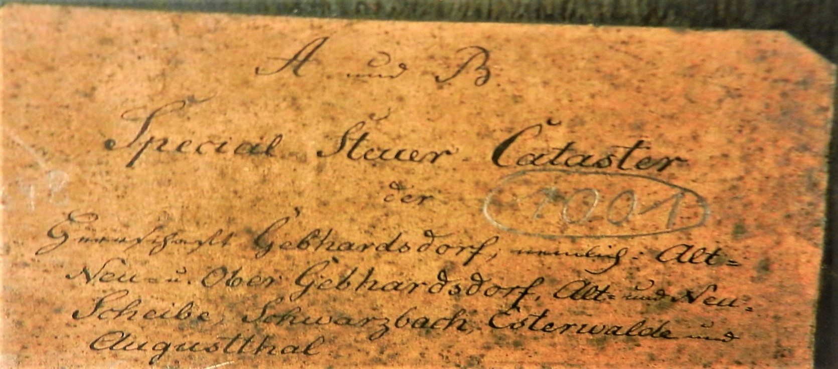 Spezial Steuer Cataster der Grundherrschaft Gebhardsdorf, eigentlich Alt Neu u. Obergebhardsdorf, alt u. Neu Scheibe, Schwarzbach,Est(h)erwalde u. Augustthal, Standort im sächs. Staatsarchiv Bautzen, 19. Jahrhundert.